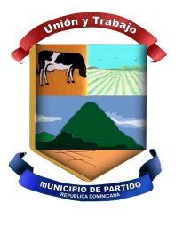 Unidad y Trabajo es el lema que identifica en sus escudo al Municipio en la Provincia de Dajabón.